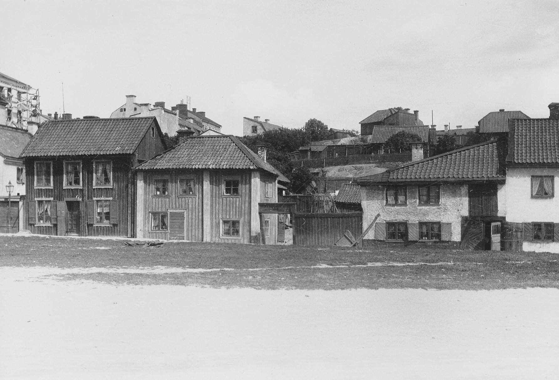 Fastigheten Bondesonen större 21, dagens Nytorget 3-7